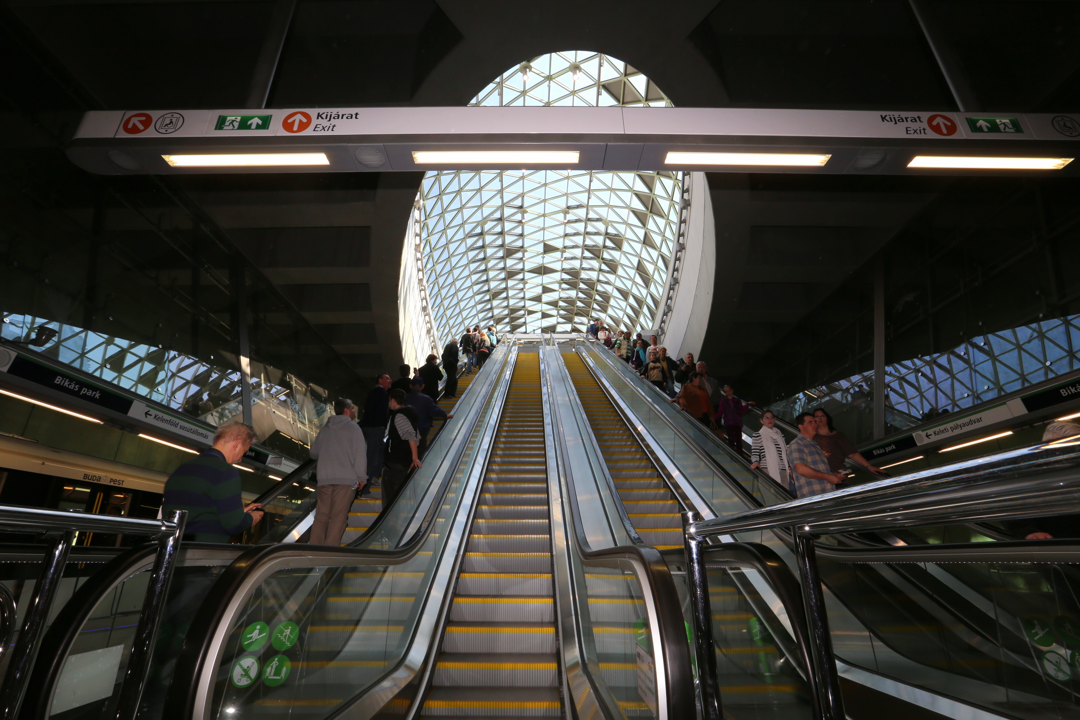 M4 Bikás park megállója